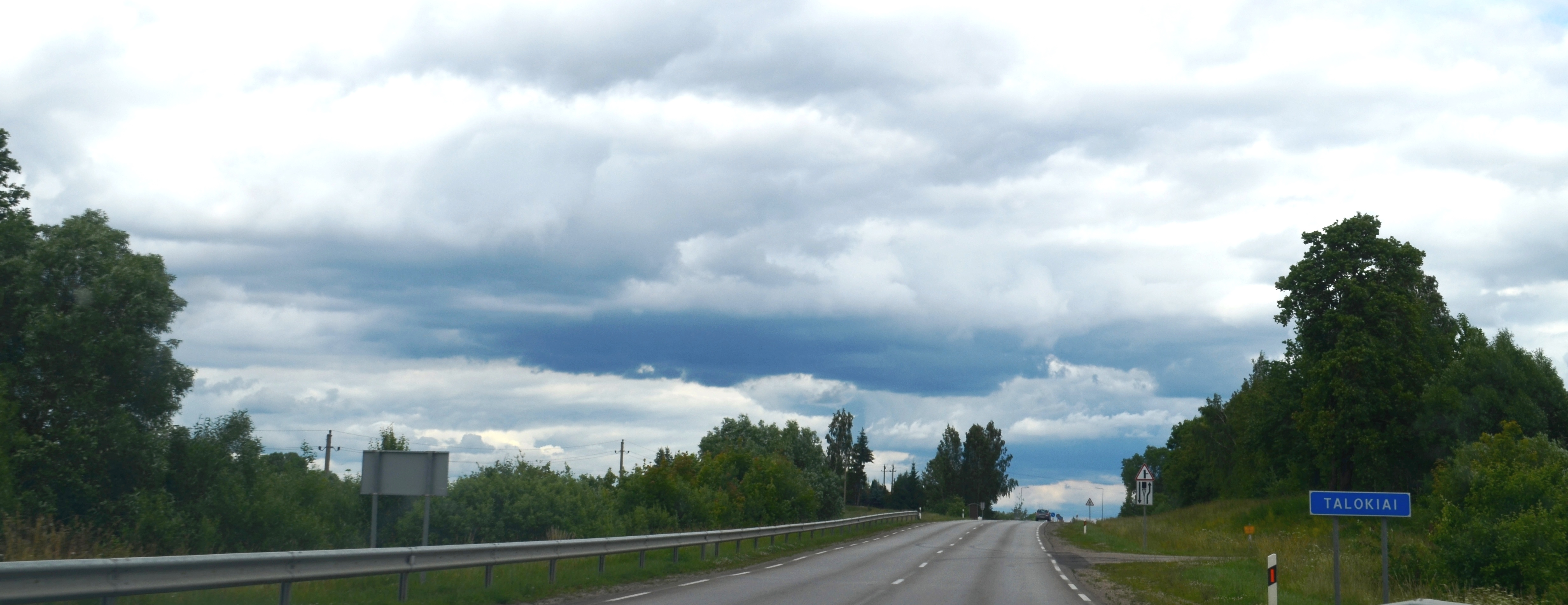 Talokiai, Alytaus raj.